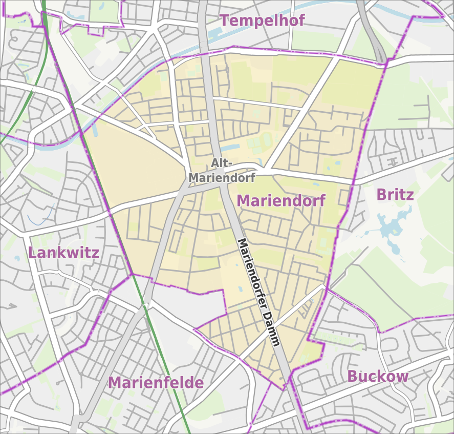 Übersichtskarte der Straßen und Ortslagen in Berlin-Mariendorf